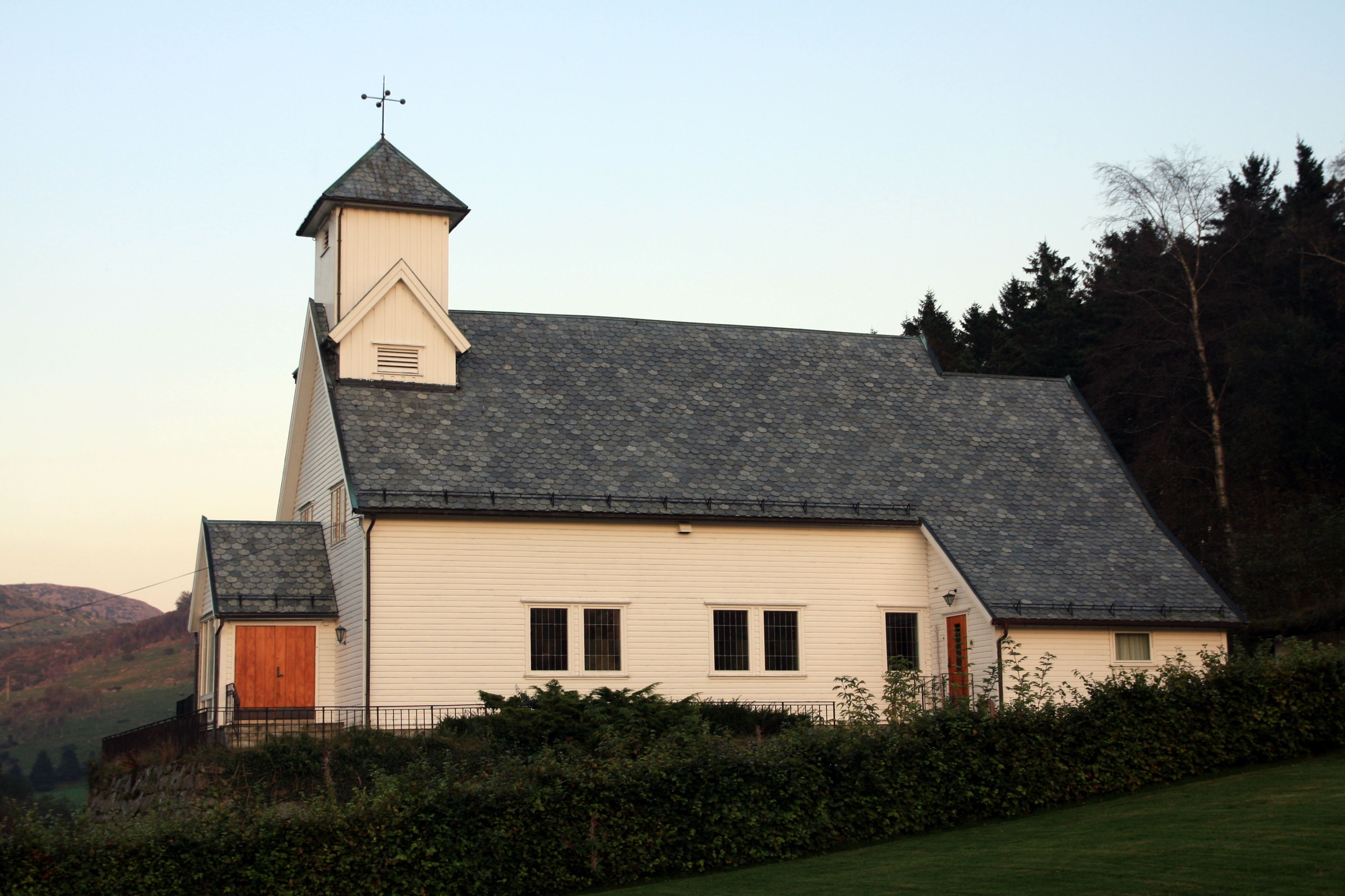 Sviland kirke